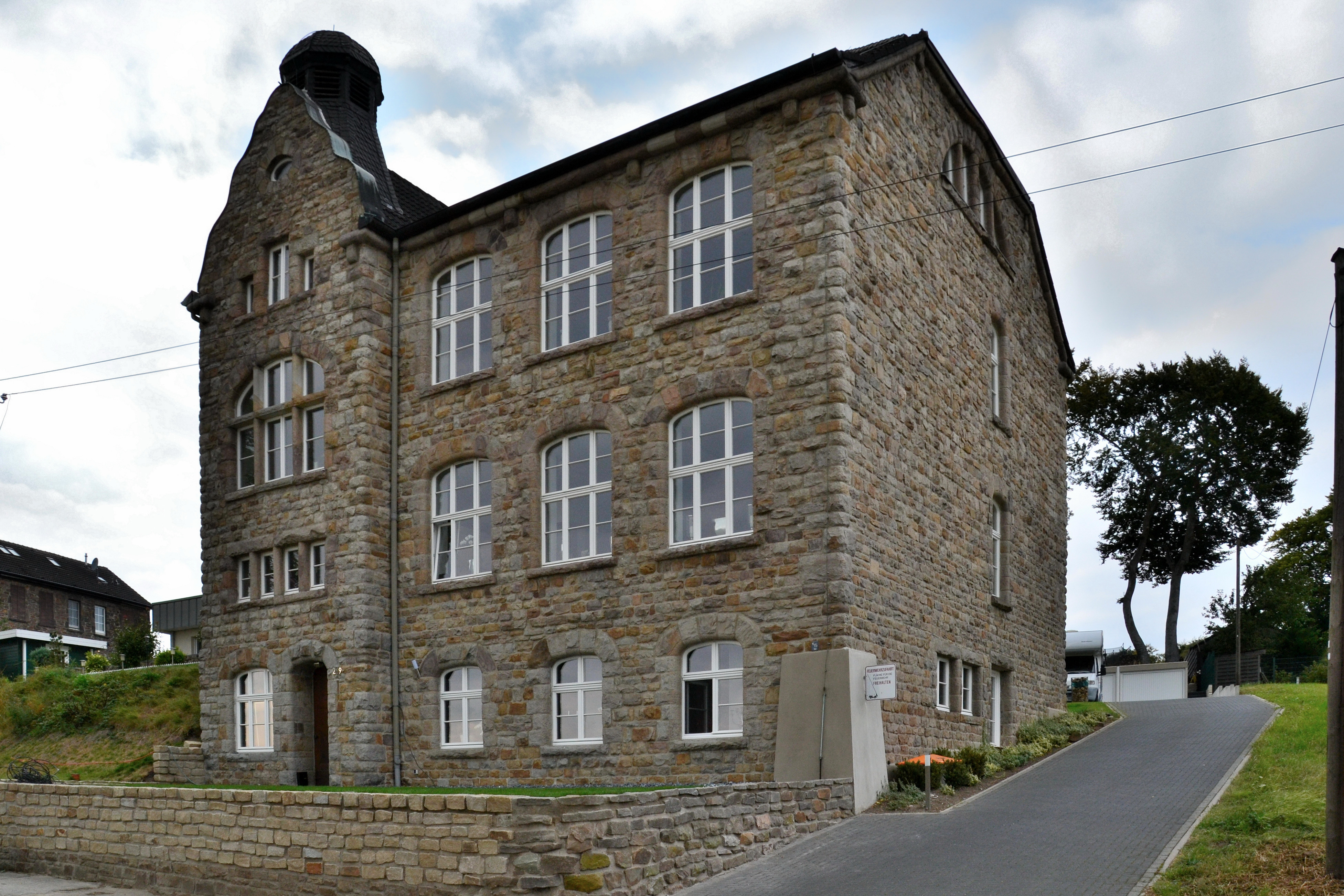 ehem. Schule Oberbyfang in Essen-Byfang, um 1900, unter Denkmalschutz